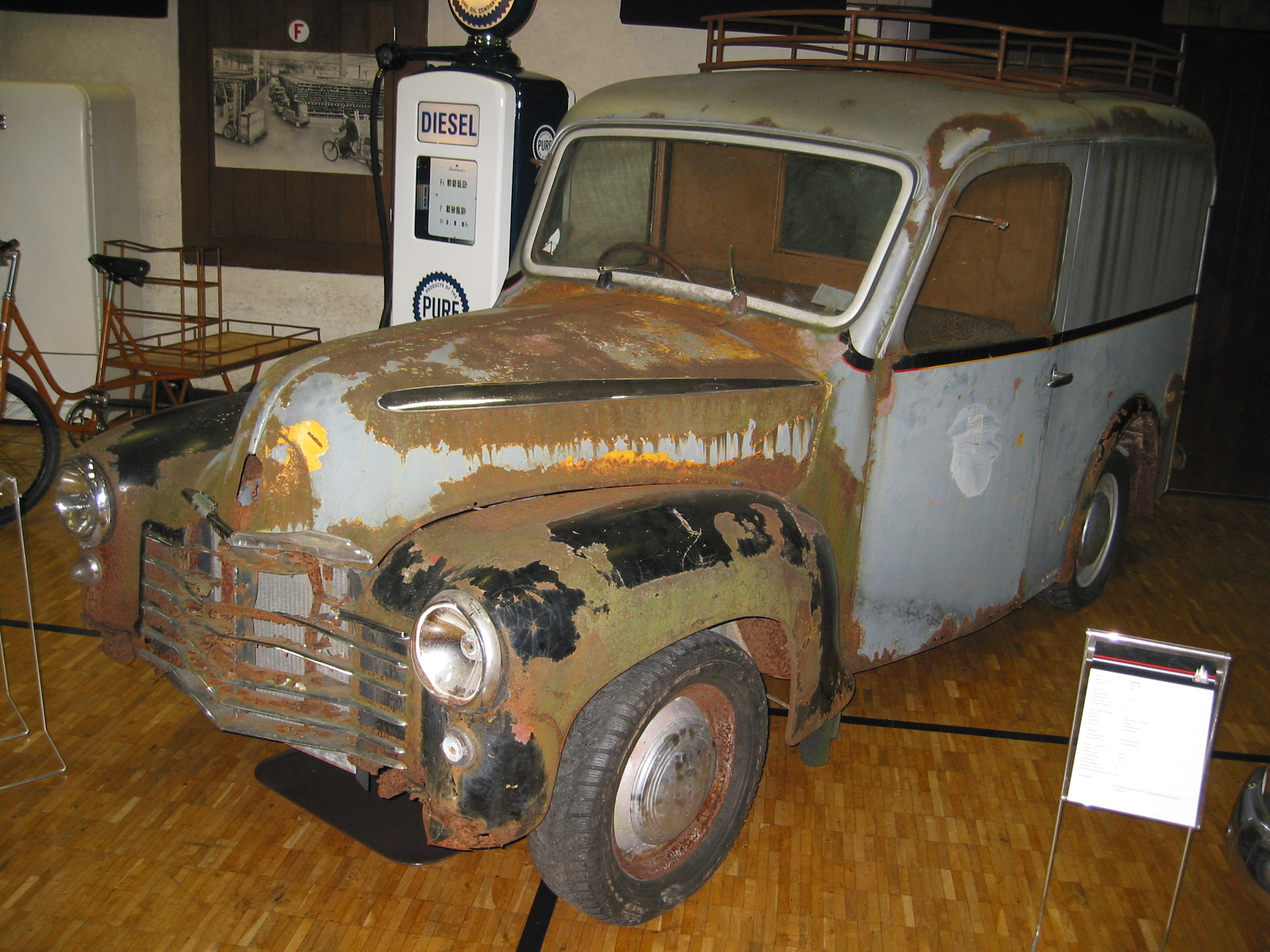 Vauxhall Postfourgon 1950, Fahrgestell von General Motors Suisse, Aufbau von Carrosserie U. Höhener’s Erben